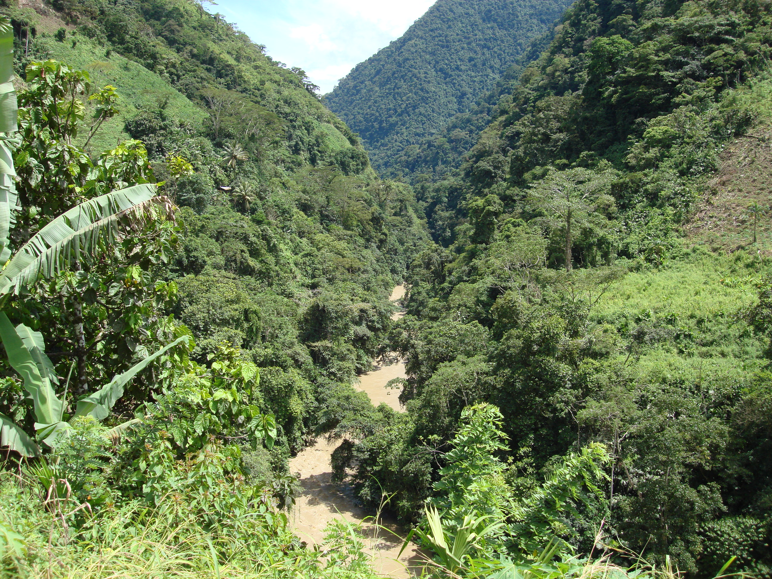 Cañon de la Llorona Dabeiba. carretera Medellin Uraba